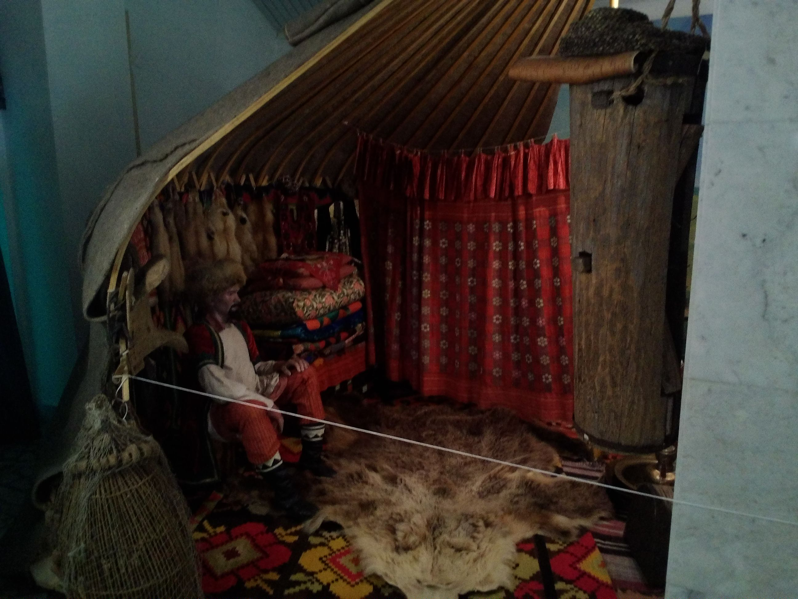 Музей Салавата Юлаєва у с. Малояз